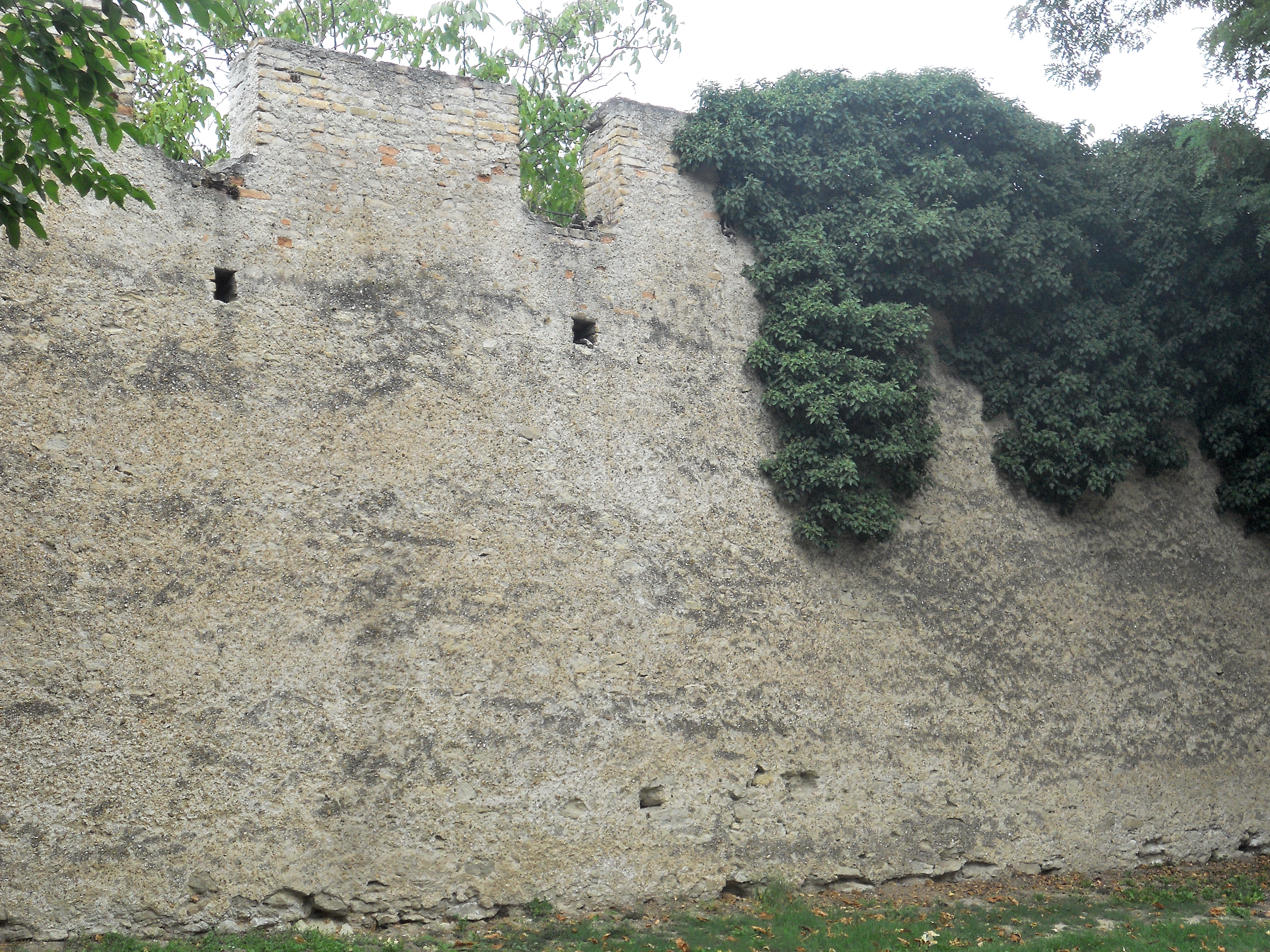 Stadtmauer